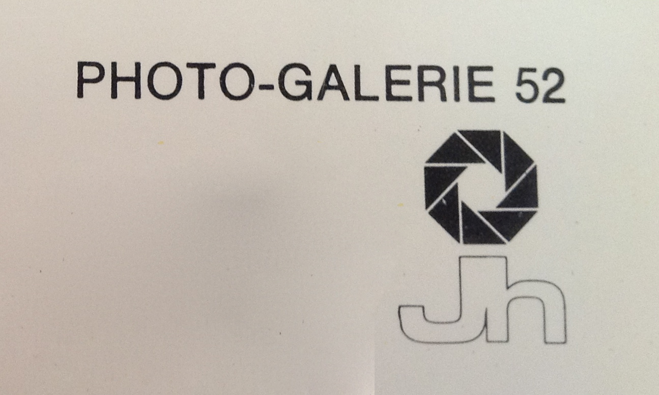 logo Photo-Galerie 52